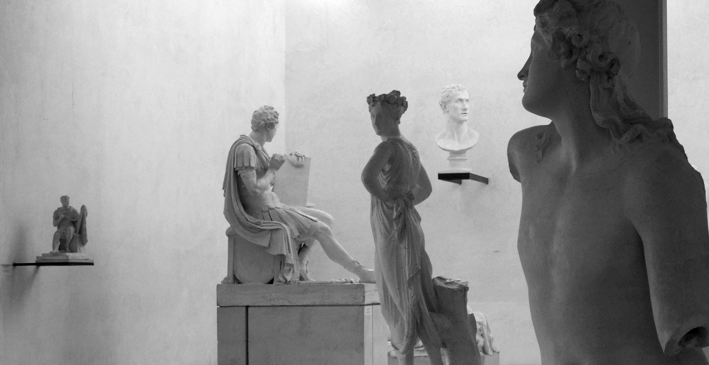 gipsoteca del canova, canova plaster cast gallery extension, possagno 1955-57. architect: carlo scarpa 1906-1978 with v. pastor.